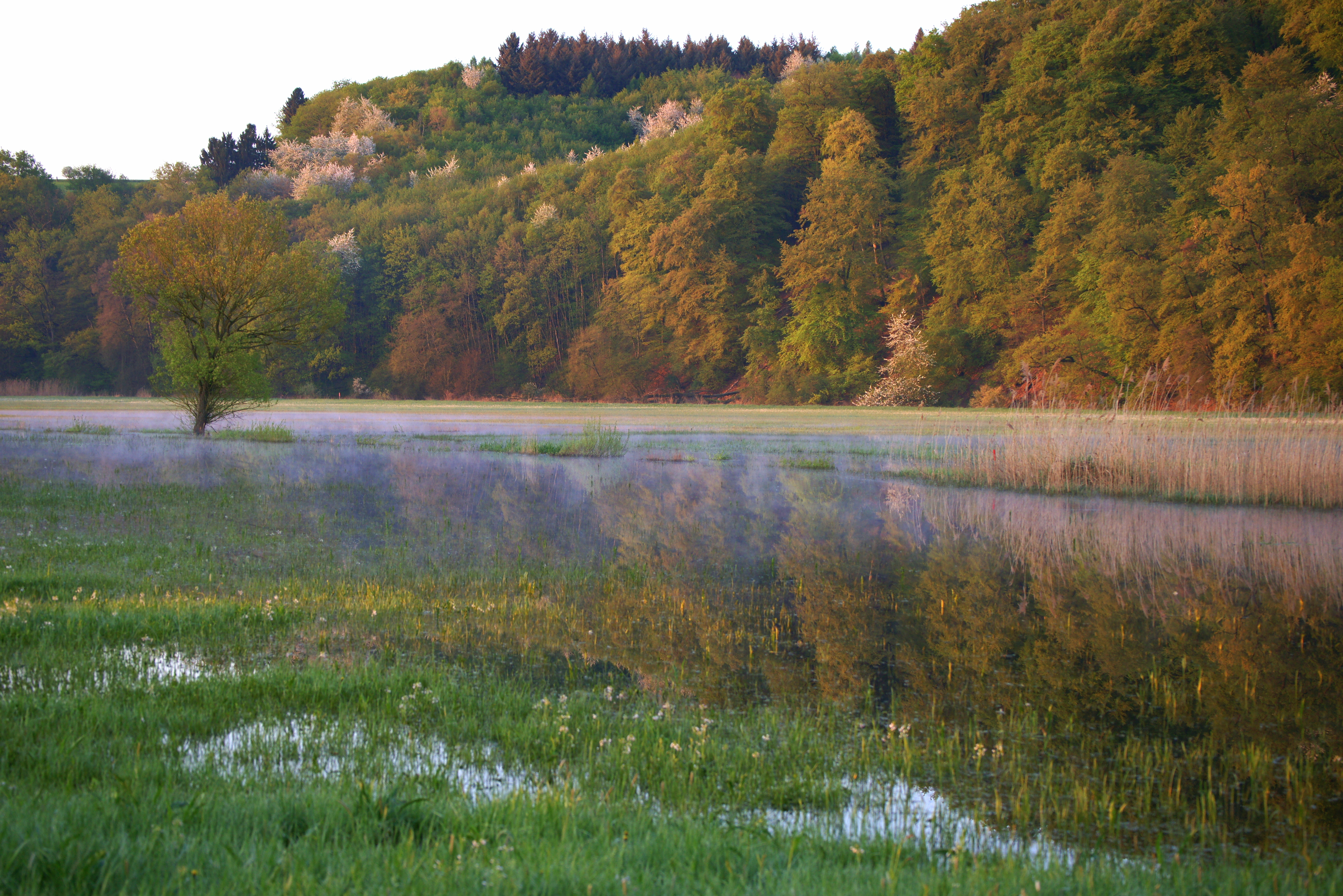 Mehrmals jährlich überschwemmt die Nidder und lässt die Bornwiesen zu einem See werden. Meistens tummeln sich dann neben den Störchen auch noch Gänse, Schwäne und Enten in dem Gebiet, bis sich das Wasser wieder zurückzieht.